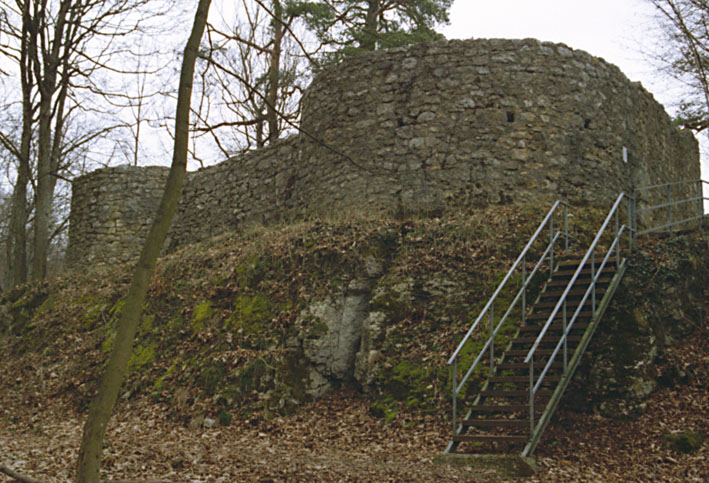 Schildmauer und Zugang zur Ruine Alt-Schauenburg